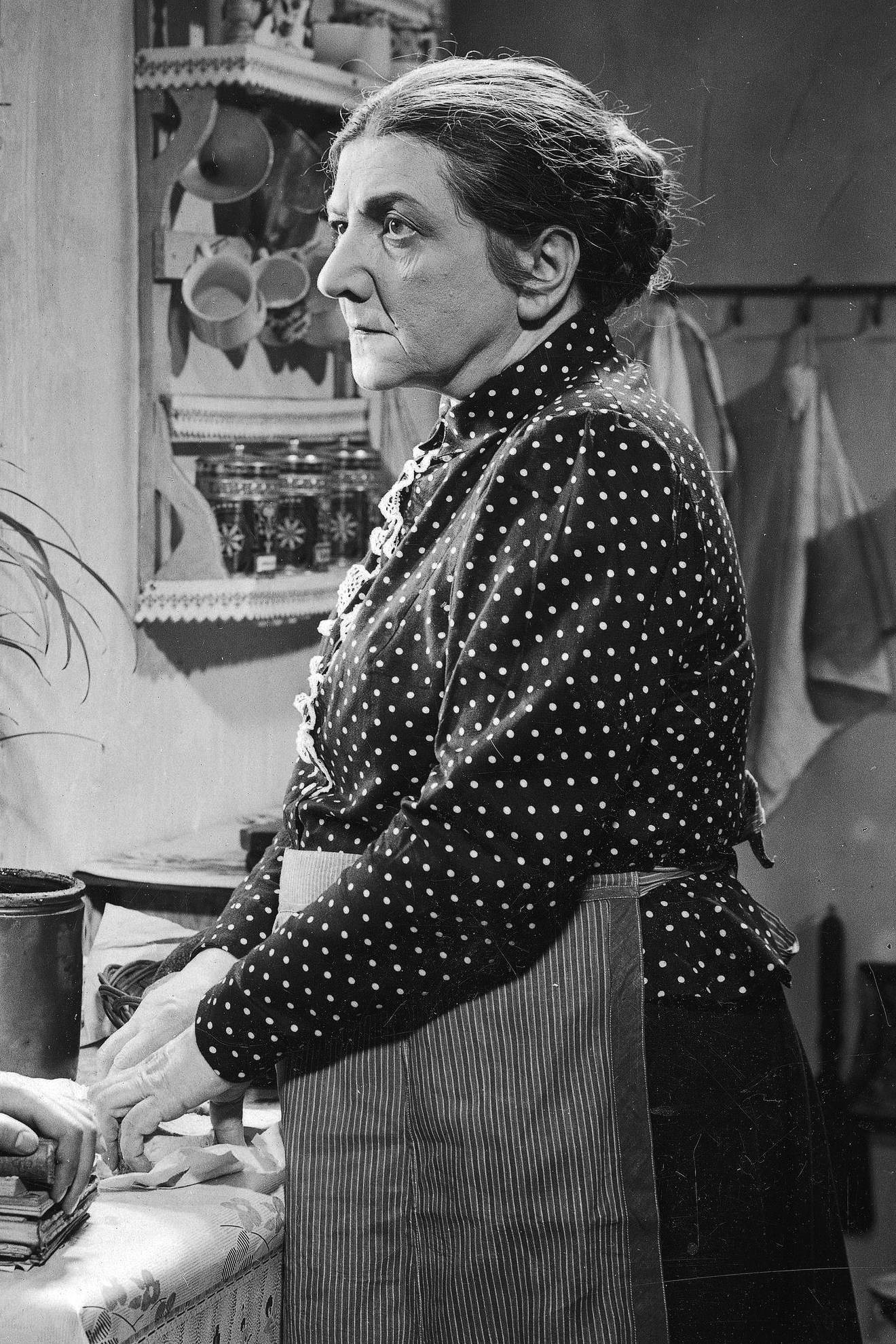 Stanisława Wysocka jako Mossakowska w jednej ze scen filmu Dziewczęta z Nowolipek, 1937 r.